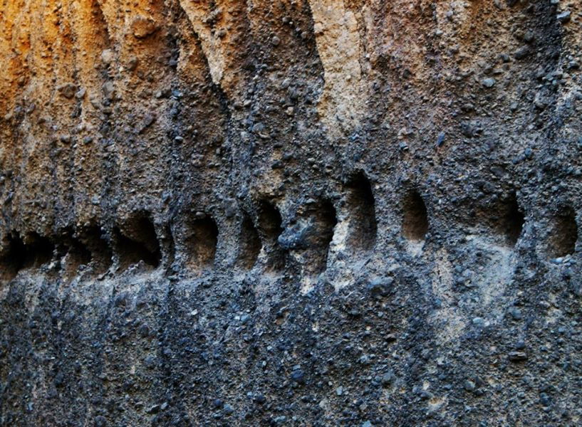 La falaise se reconnait à ses anfractuosités